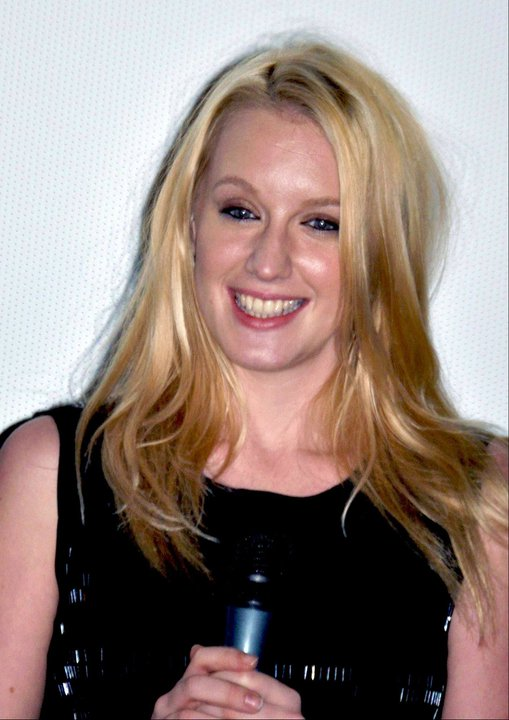 Ludivine Sagnier à l'avant-première du film "Pieds nus sur les limaces"